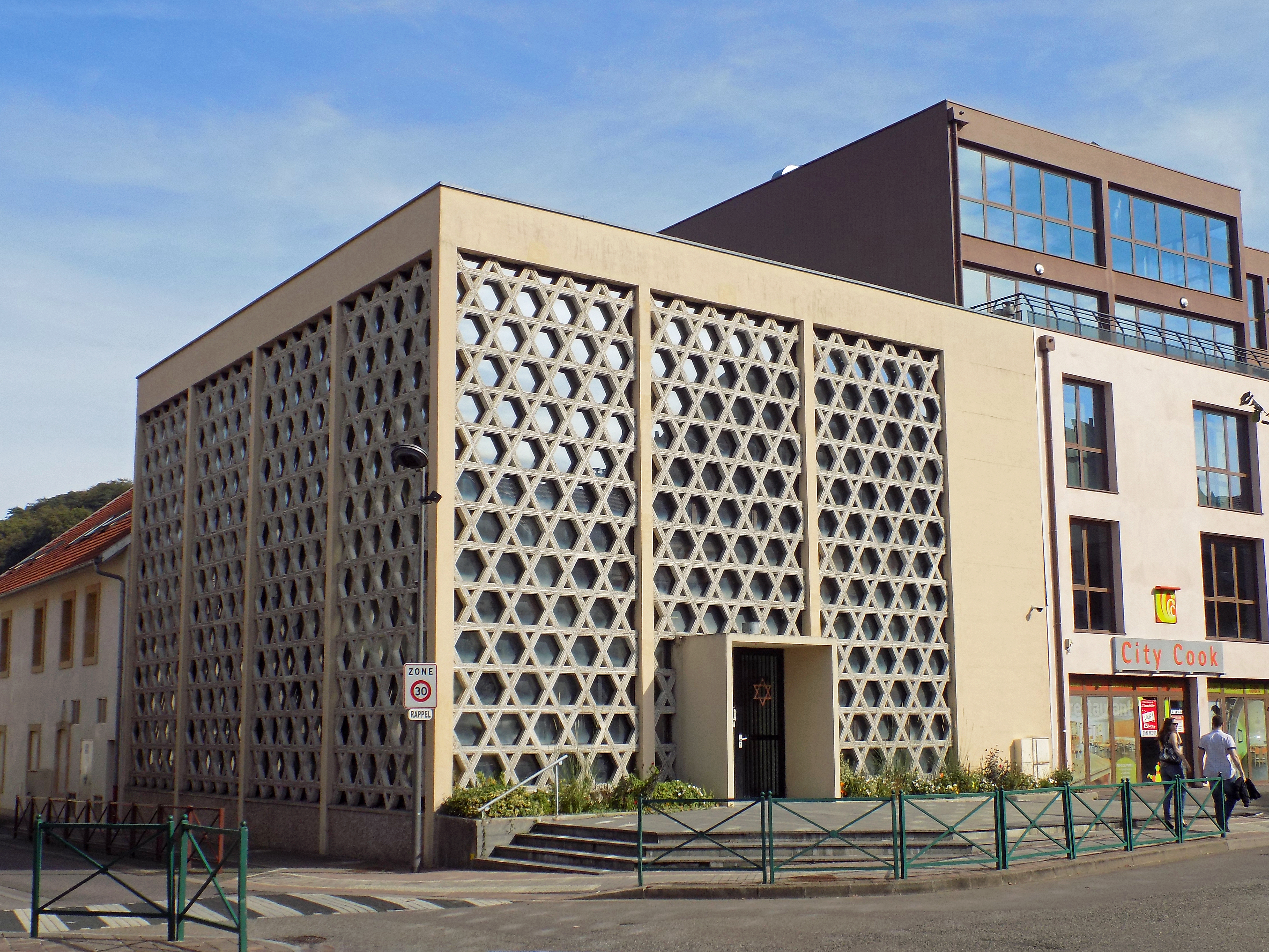 Synagogue de Saint-Avold (Moselle), achevée en 1956. Conçue par l’architecte messin Roger Zonca et le bureau d'études Constructa, elle est située à l’angle de la rue des Américains et de la rue de la Mertzelle près de la place Paul Collin à Saint-Avold.